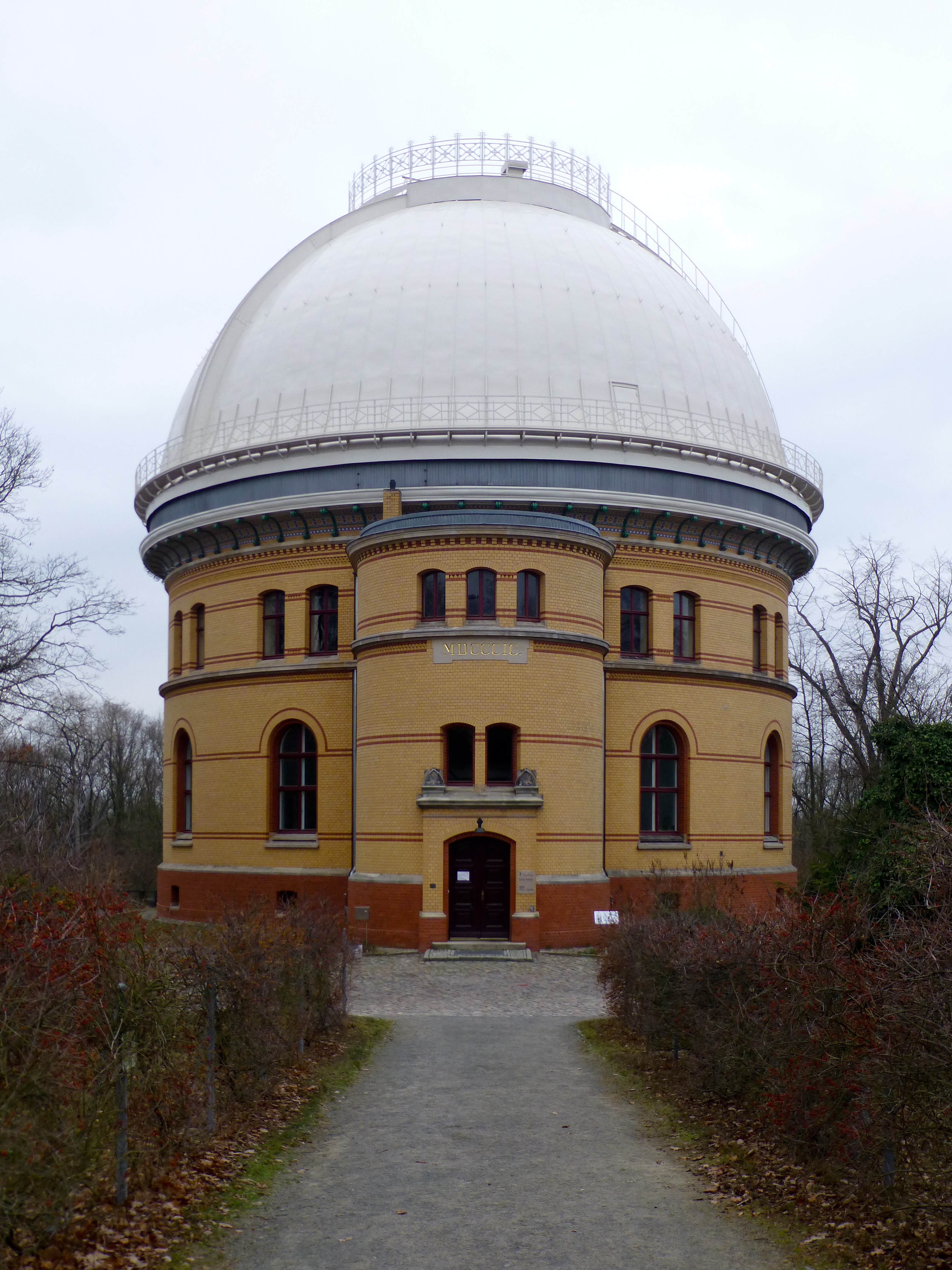 Großer Refraktor auf dem Telegrafenberg in Potsdam